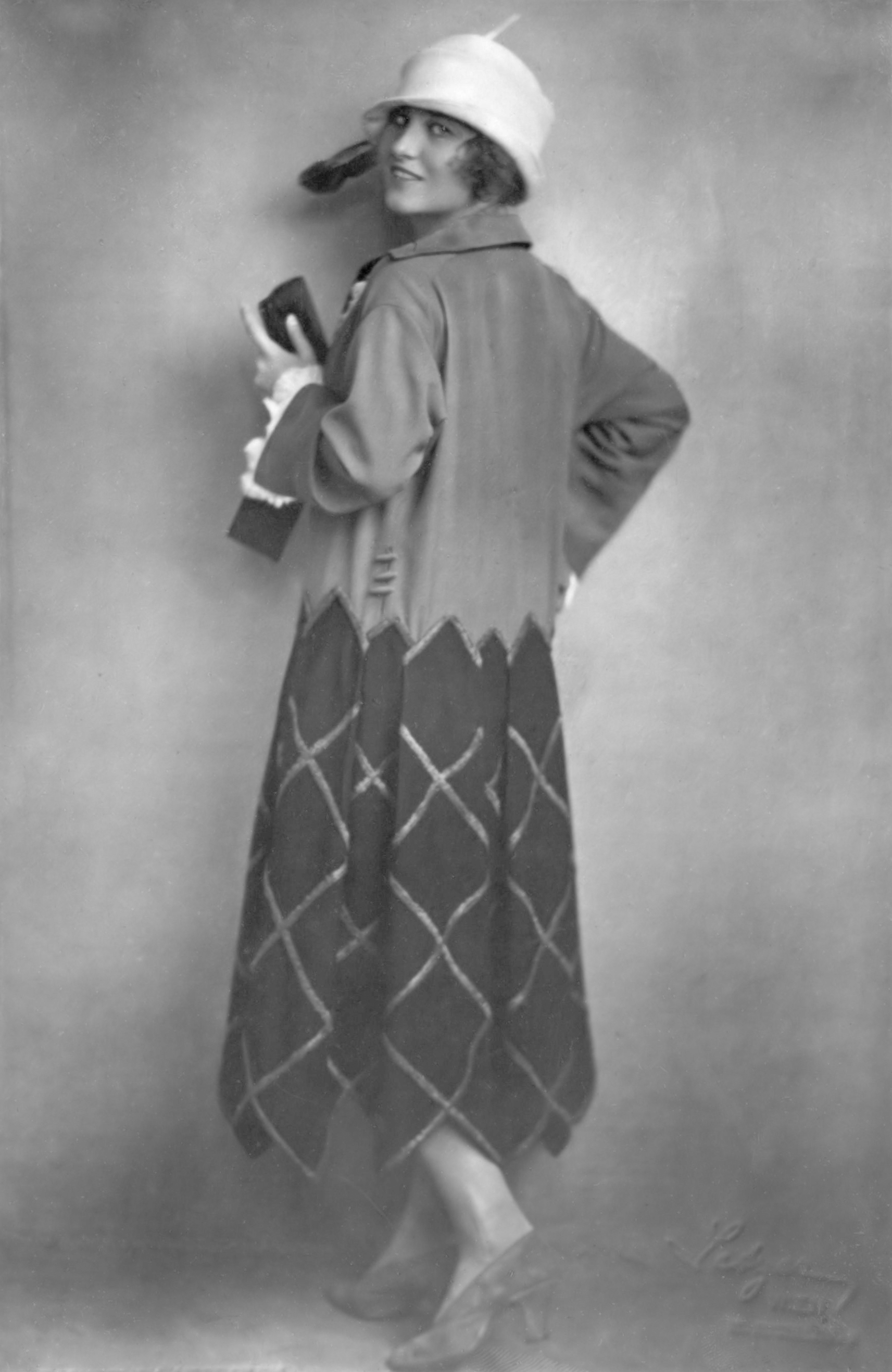 Marie Mayen, actrice 1922